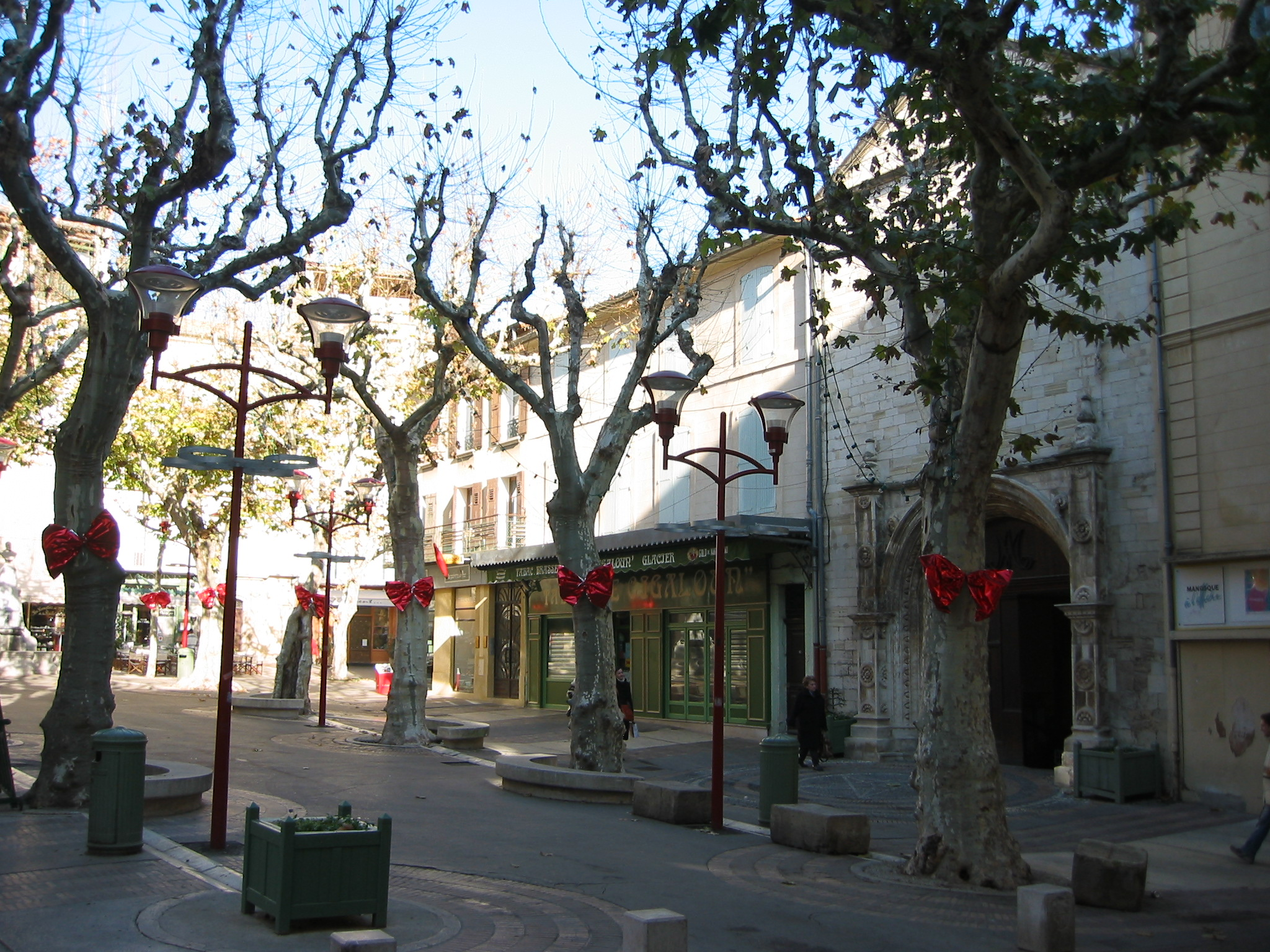 La Place de l'Hotel de Ville, Manosque, Provence, France